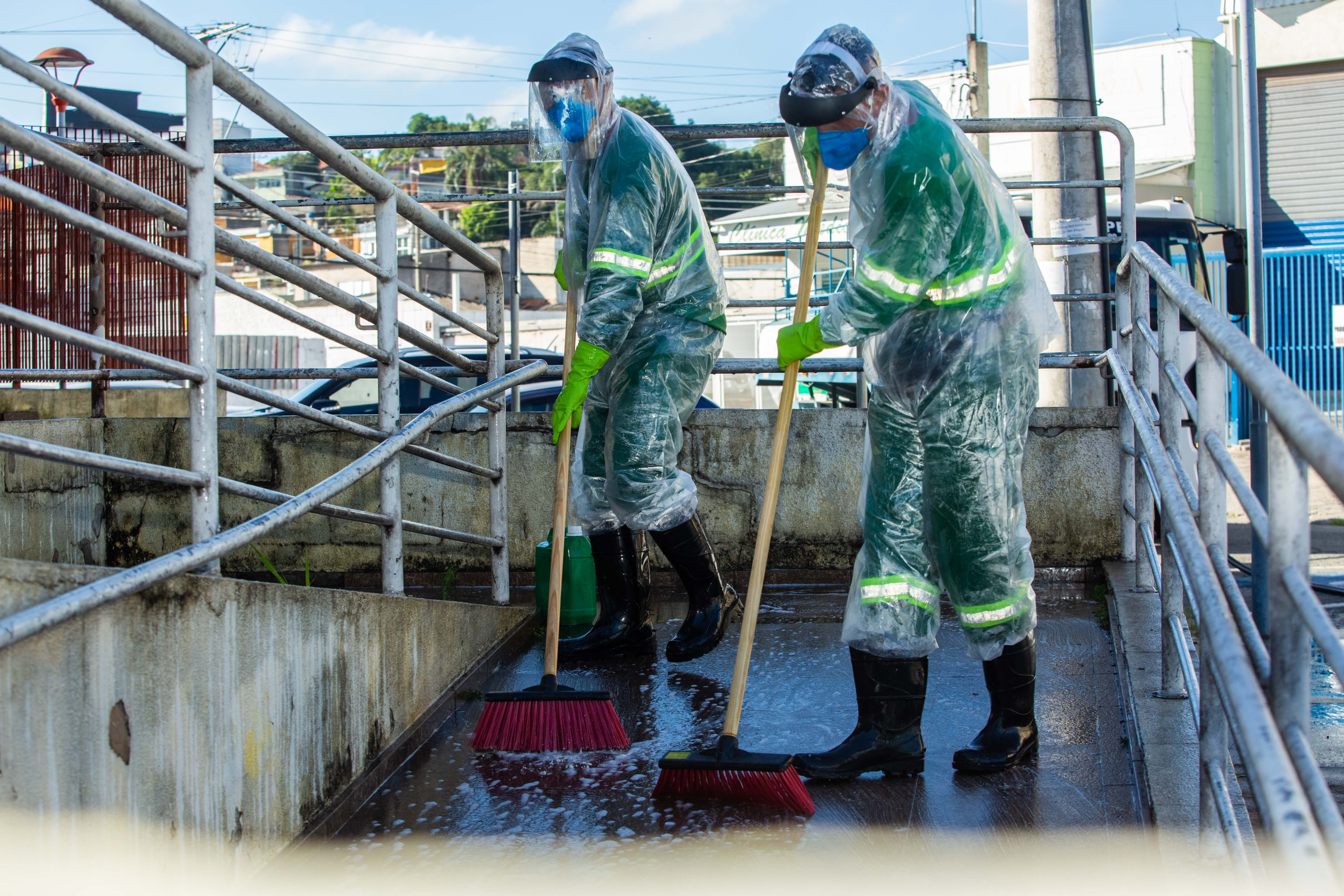 Foto: Willian Leite/PMI